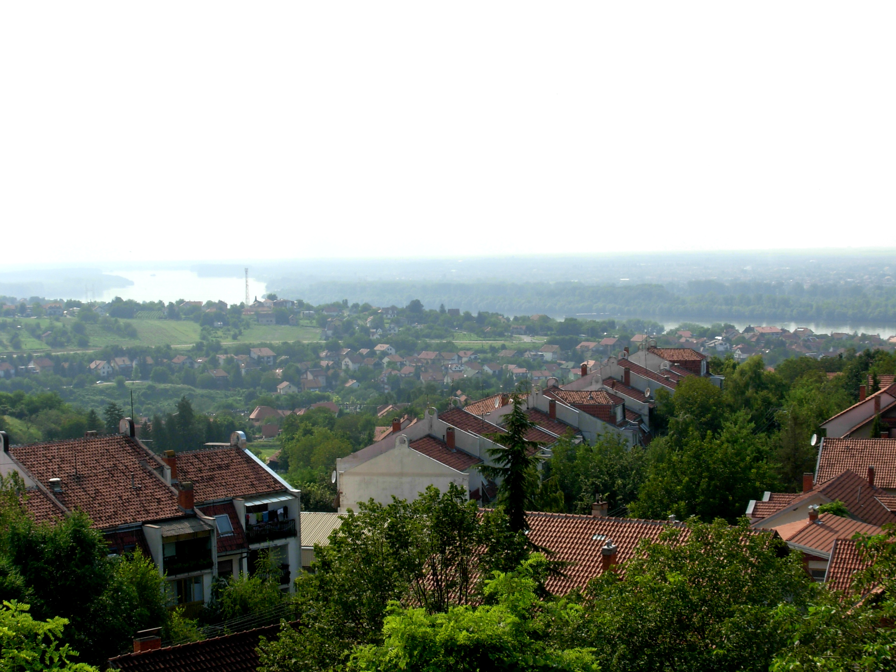 Pogled na Sremsku Kamenicu.